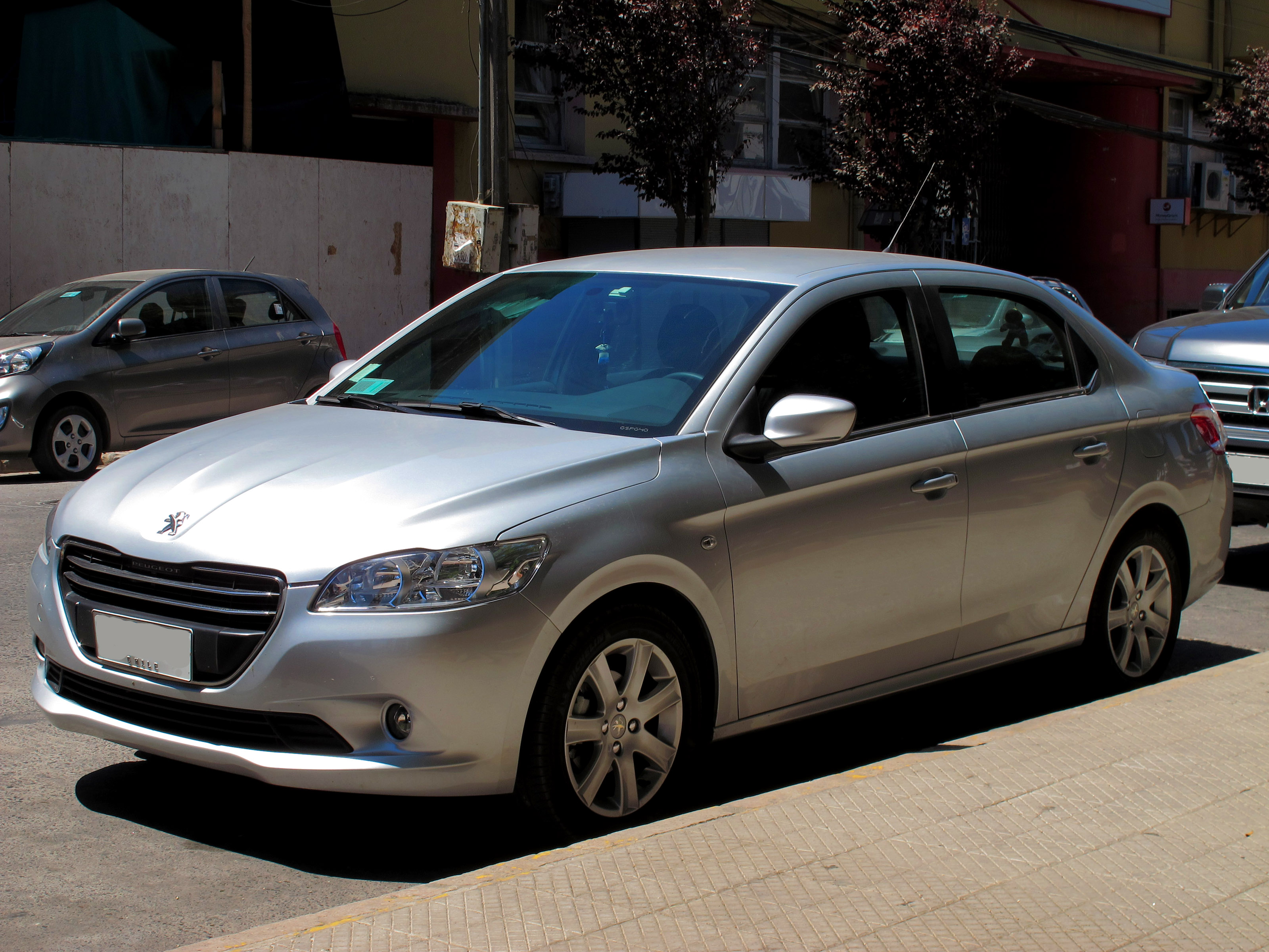 Peugeot 301 1.6 HDi Allure 2014